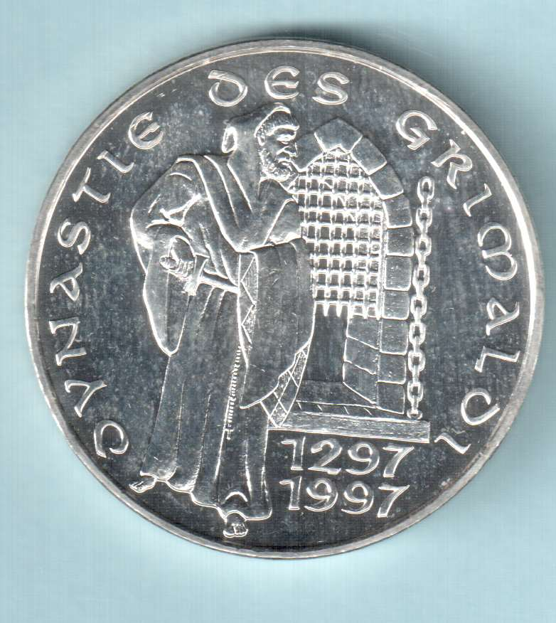 Монако 100 франков 1997 аверс